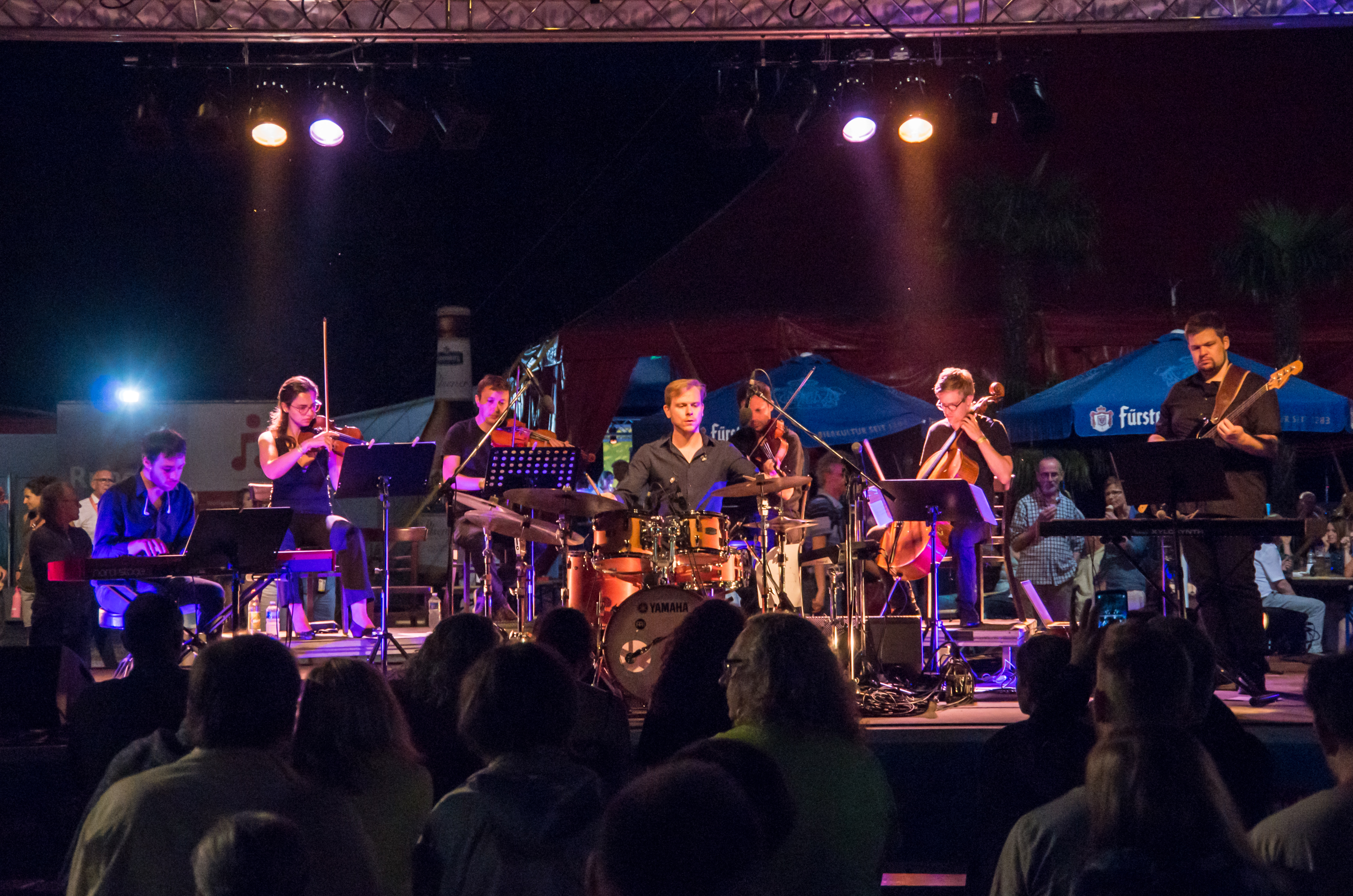 Das Zelt-Musik-Festival 2019 in Freiburg im Breisgau 17.07.2019 Dimitri Monstein Ensemble